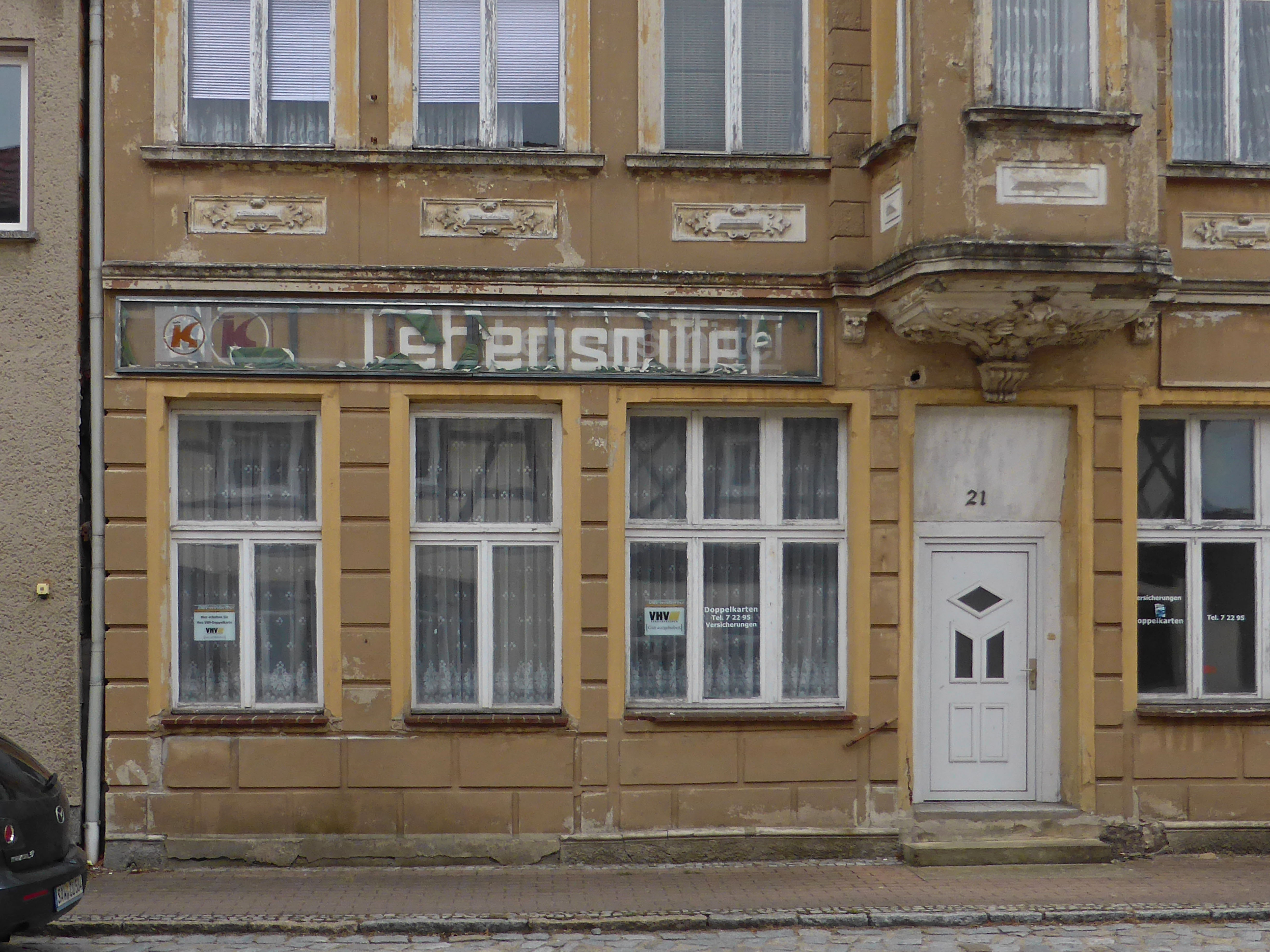 Ehemaliger Konsum-Laden in Kalbe an der Milde.